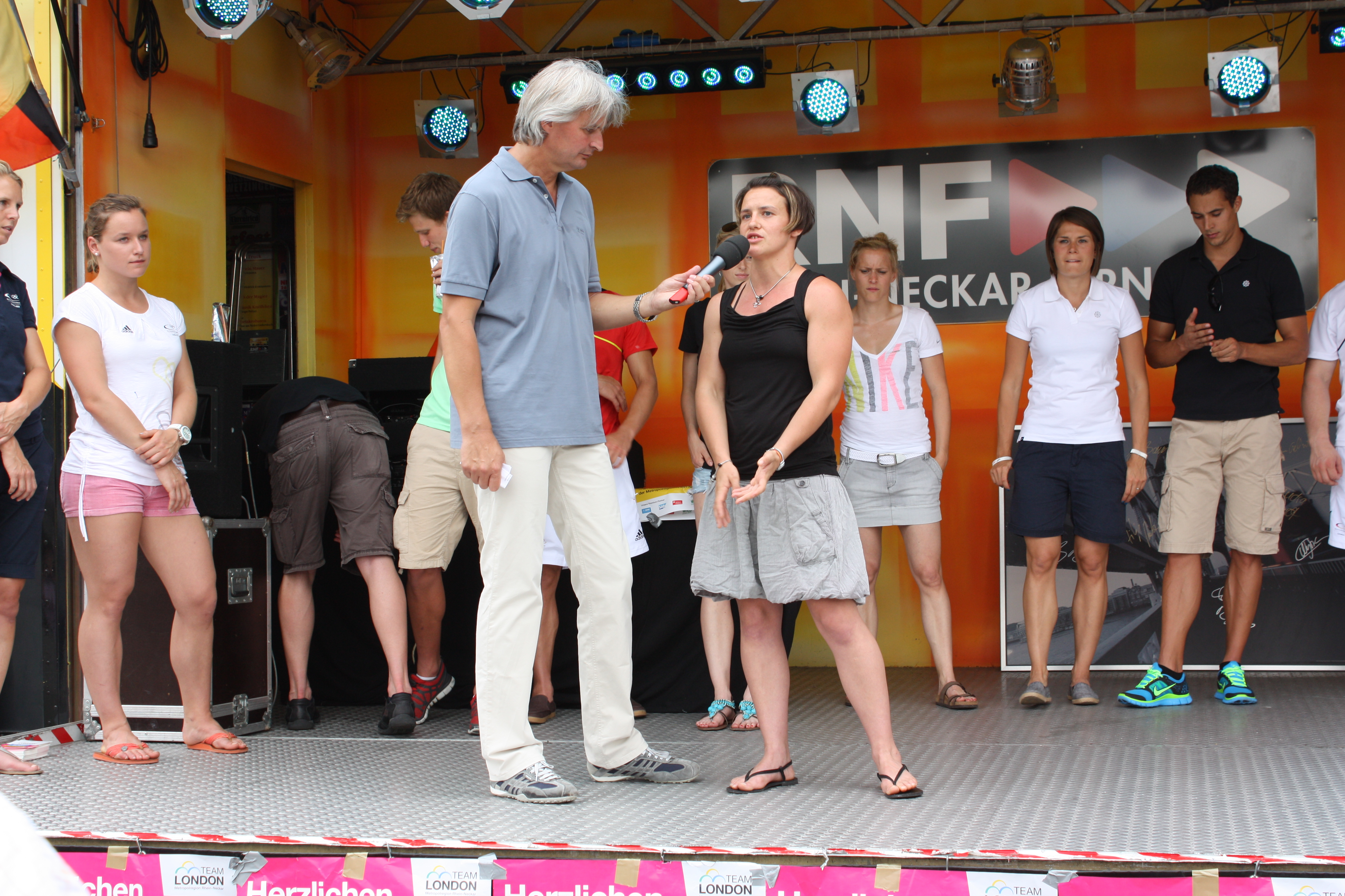 Alexandra Engelhardt beim Empfang der Olympia-Teilnehmer des Teams London der Metropolregion Rhein-Neckar 2012 in Mannheim.